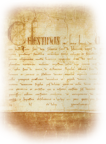 Bulla of pope Celestin V (Italian: Bolla di perdonanza Celestiniana)